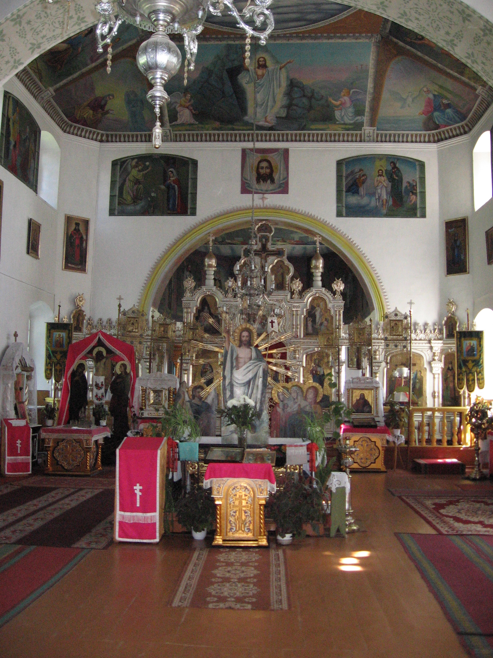 Беларуская (тарашкевіца): Царква ўзьвіжаньня Сьвятога Крыжа (Сухопаль). Агульны інтэр'ер. This is a photo of Belarusian heritage monument. Reference number: 113Г000652 ( WLM)